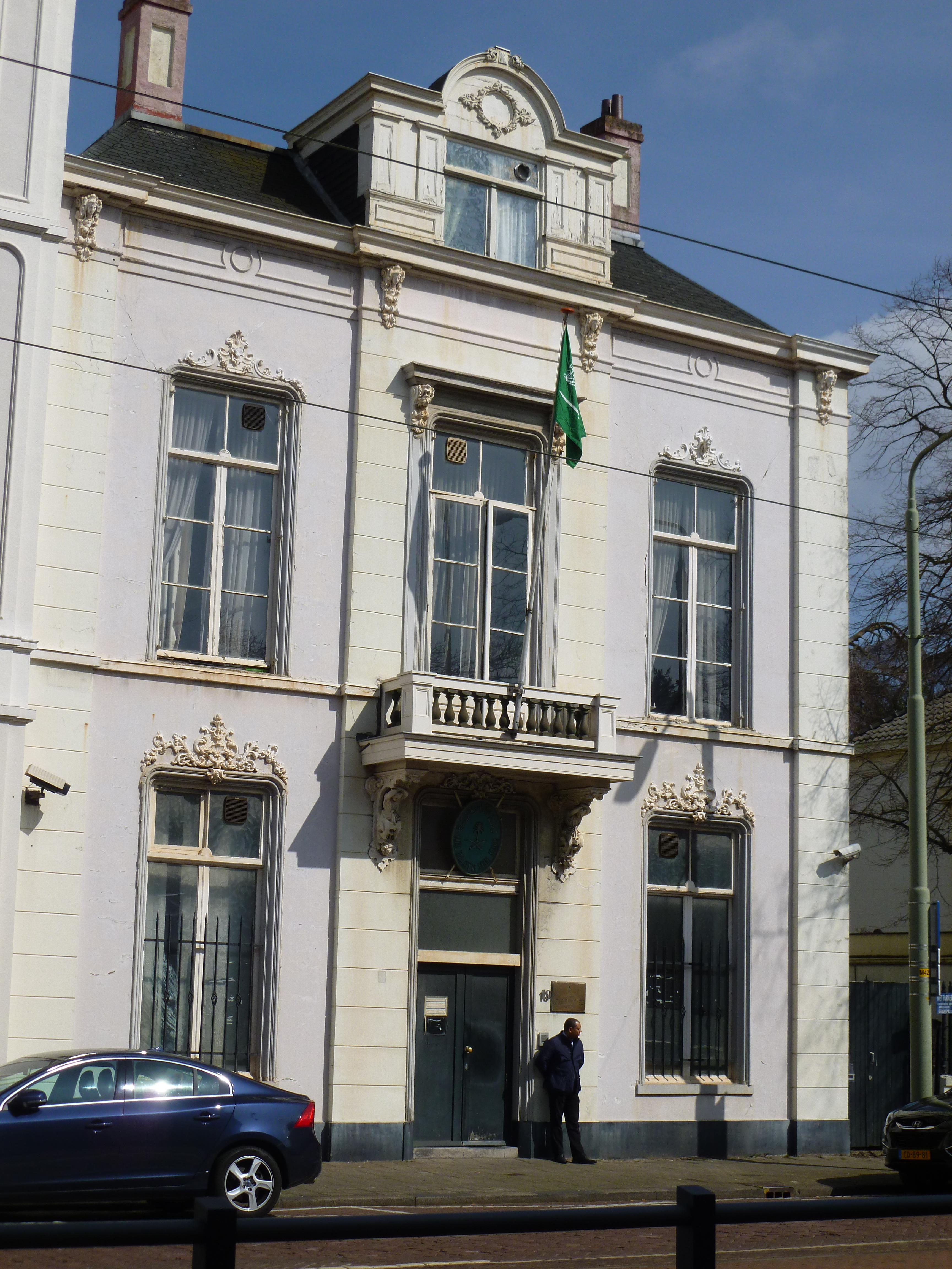 Embassy of Saudi Arabia, The Hague